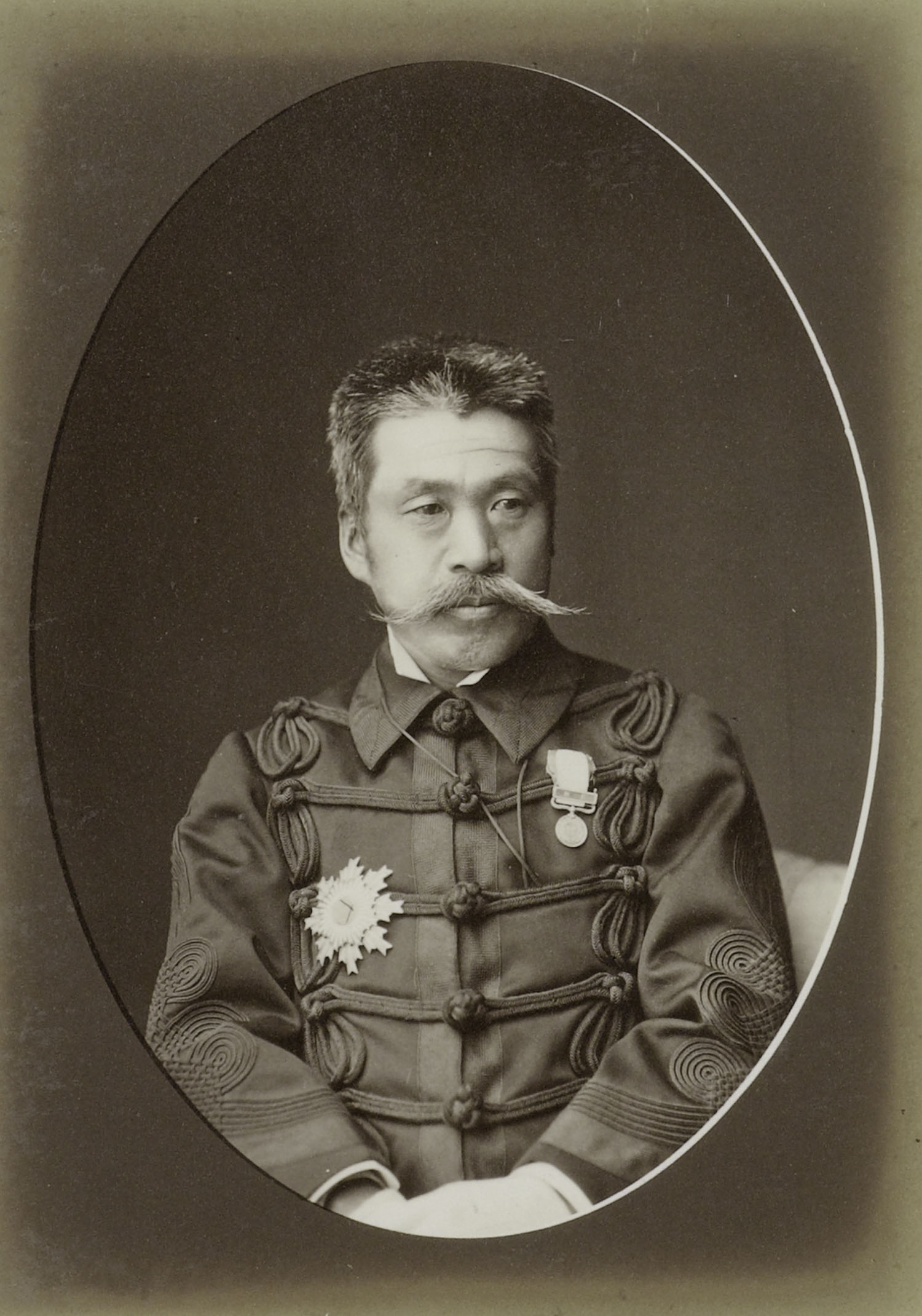 明治初期の谷。